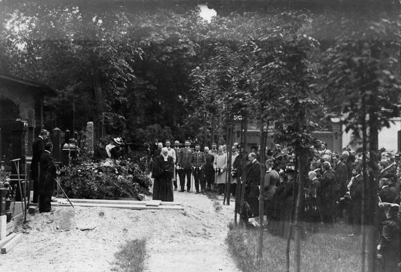 Beisetzung Eduard von Hartmanns Berlin. Die Beisetzung Eduard von Hartmanns auf dem Garnisonfriedhof in der Hasenheide. [Berlin.- Garnisonfriedhof, Beisetzung von Eduard von Hartmann] Abgebildete Personen: Hartmann, Eduard von: Philosoph, Deutschland